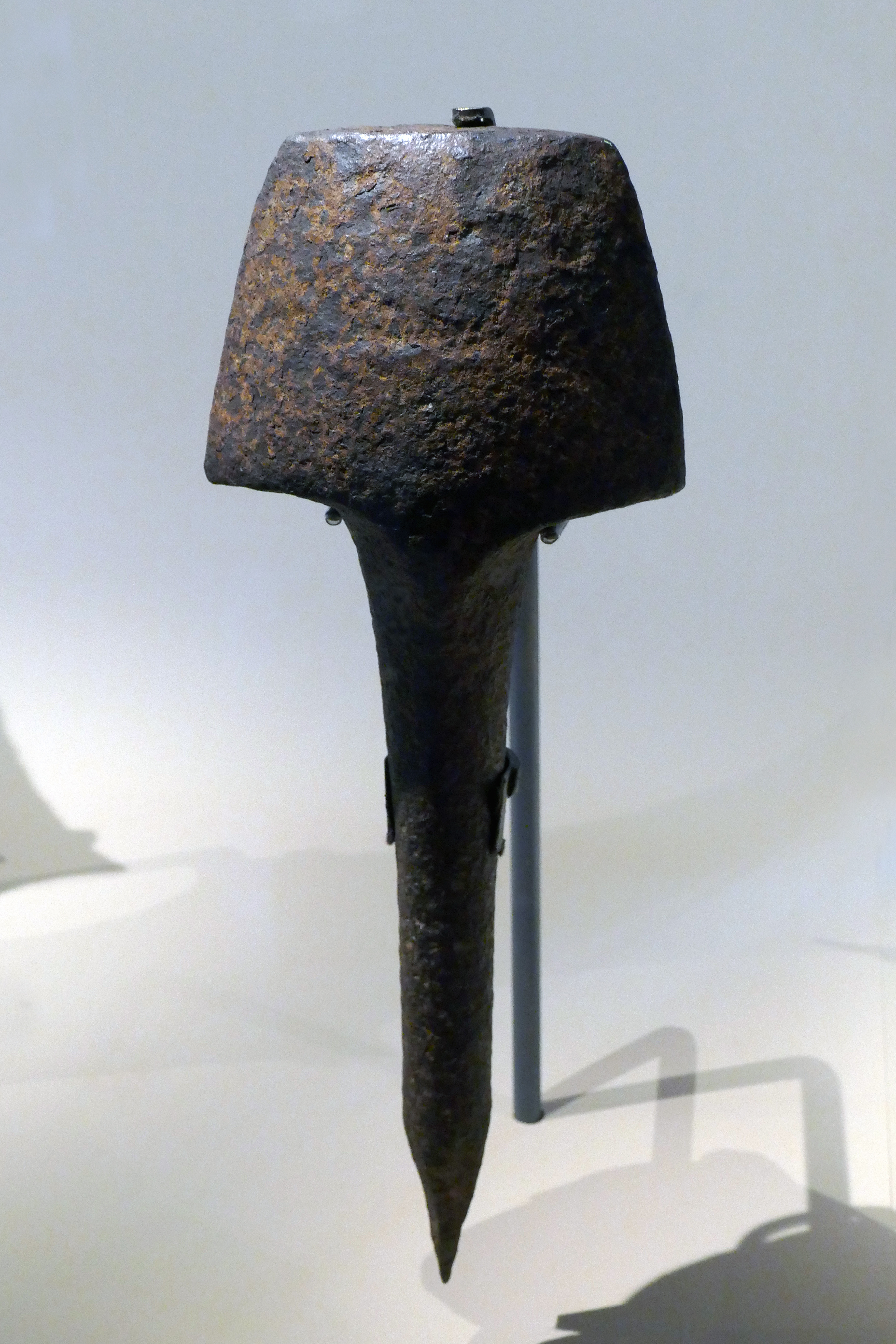 Marteau (mala) Population Mfumte (Nigeria et Cameroun) Artiste inconnu Fin du 19e siècle Fer Objet présenté lors de l'exposition Frapper le fer. L'art des forgerons africains au musée du quai Branly Jacques Chirac.